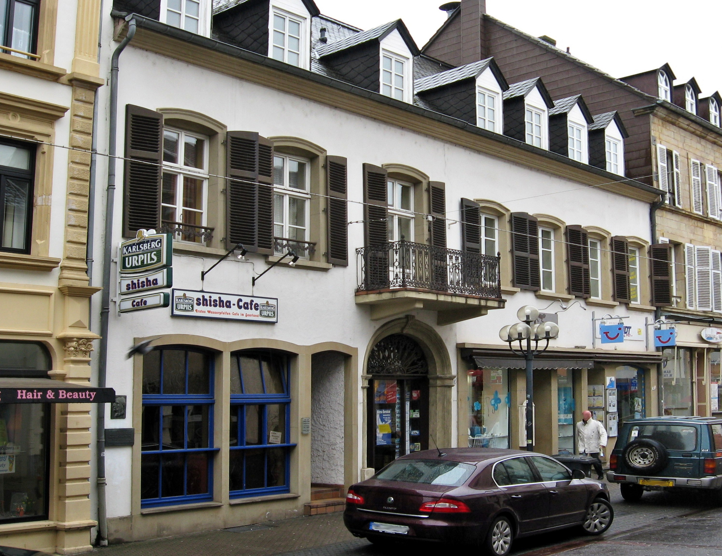 Geburtshaus von Paul von Lettow-Vorbeck in Saarlouis